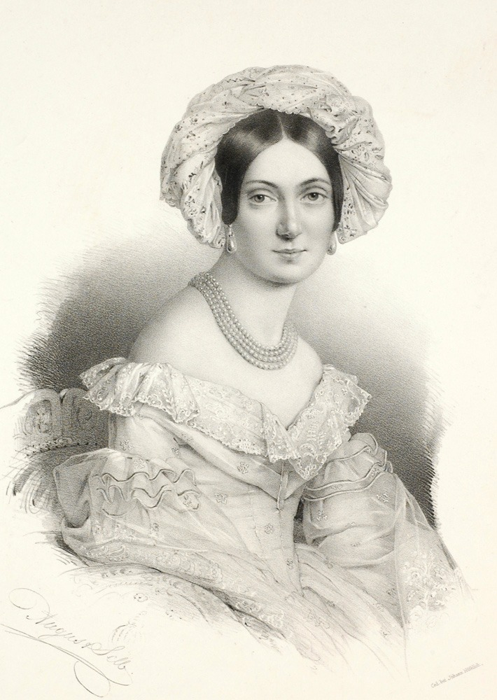 Princess Melanie Metternich - Austrian aristocrat